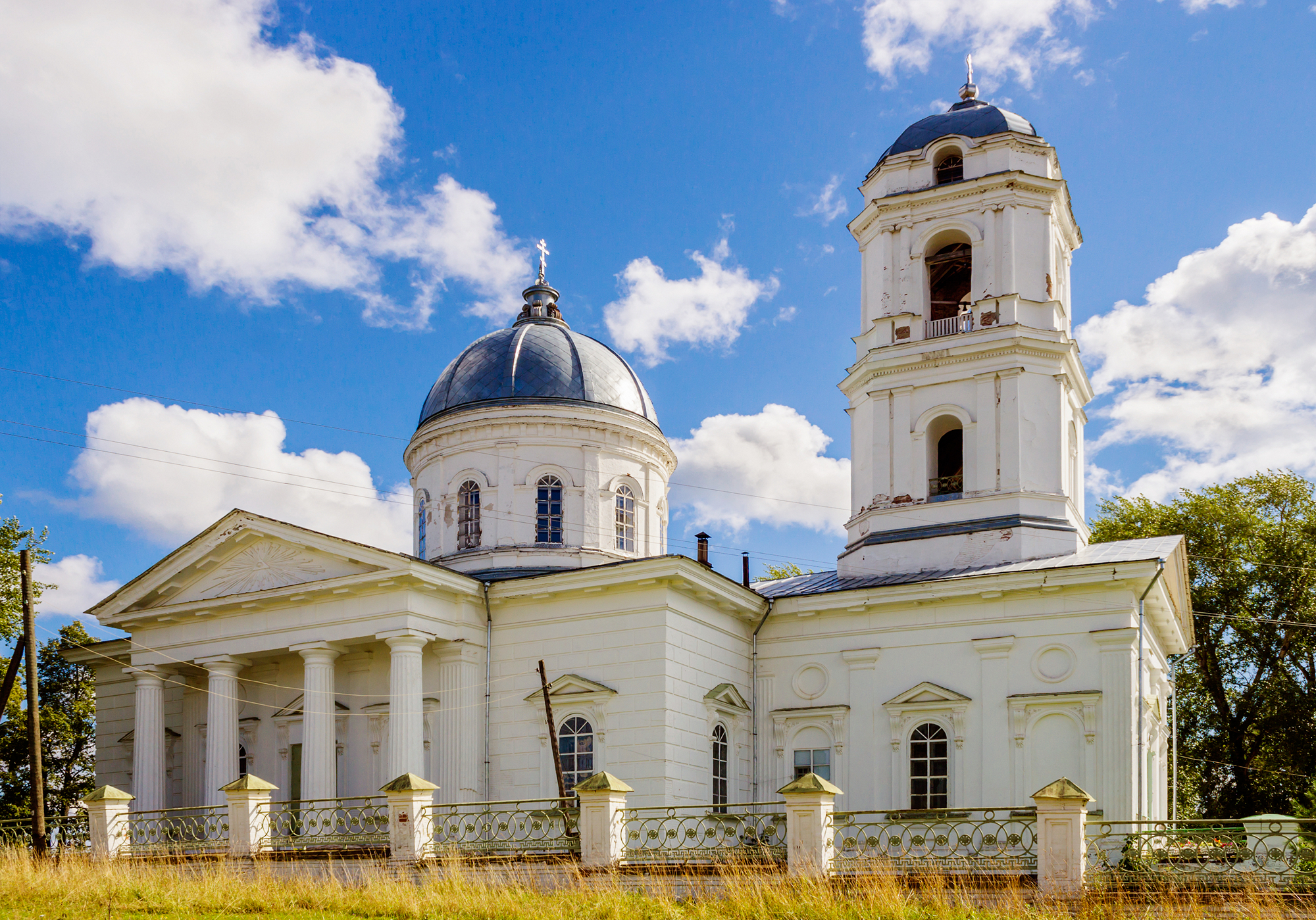 Свято-Троицкая церковь: улица Ленина, 14, Пожва, Юсьвинский район, Пермский край